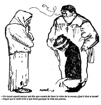 Dibuix d'Isidre Nonell per a "Papitu".